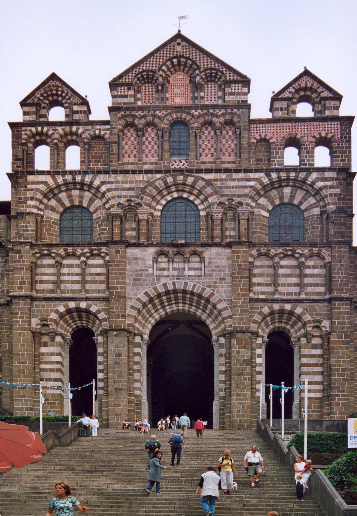 Le Puy-en-Velay Haute-Loire France